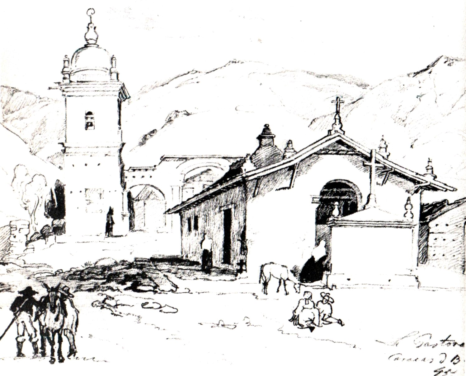 La pastora en Caracas. Colección Museos Estadales de Berlín, Alemania